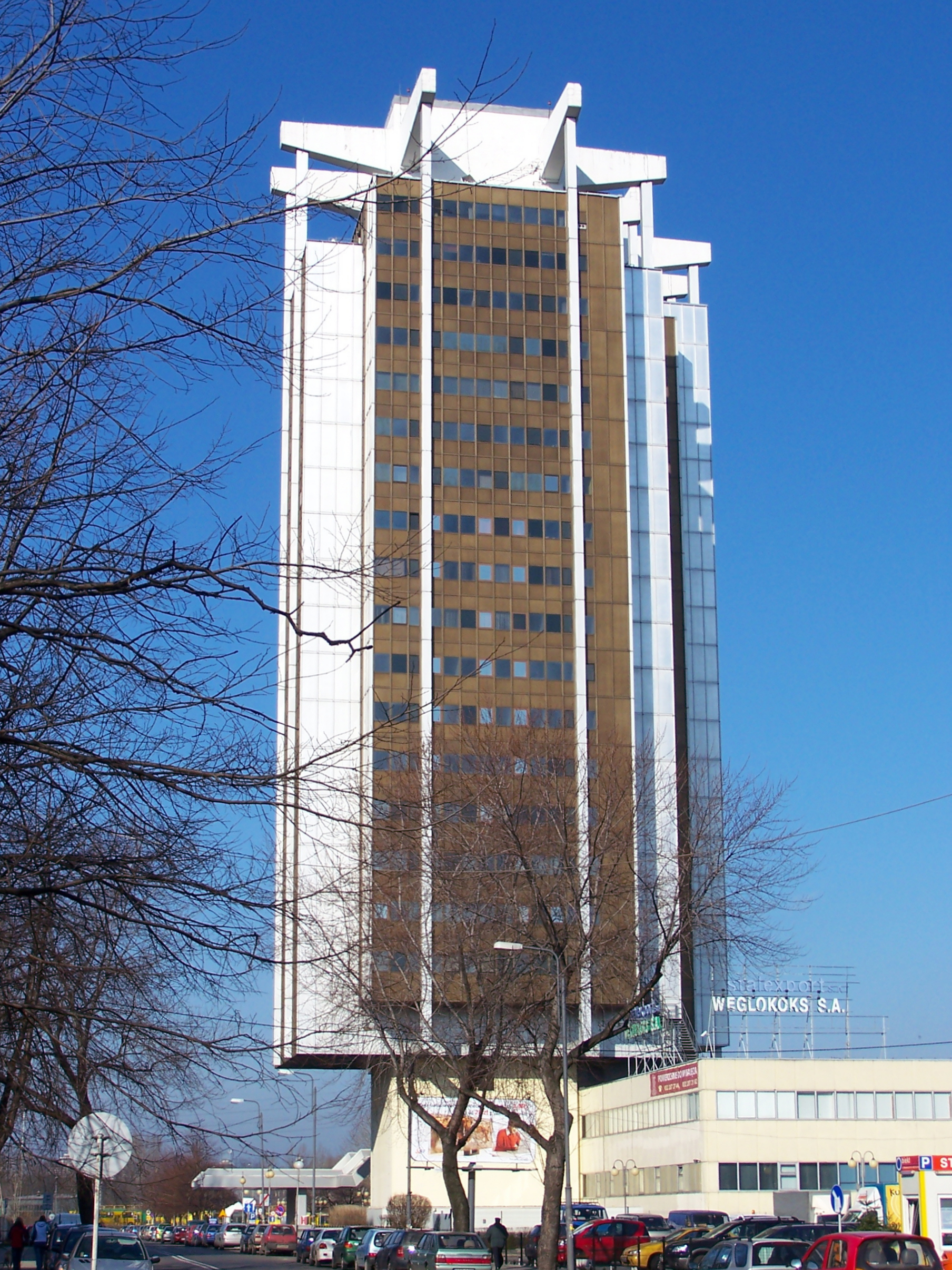 Wieżowiec Stalexportu w Katowicach.